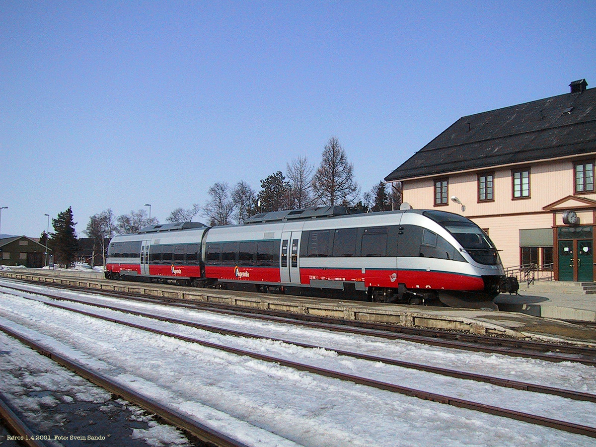 Røros, class 93